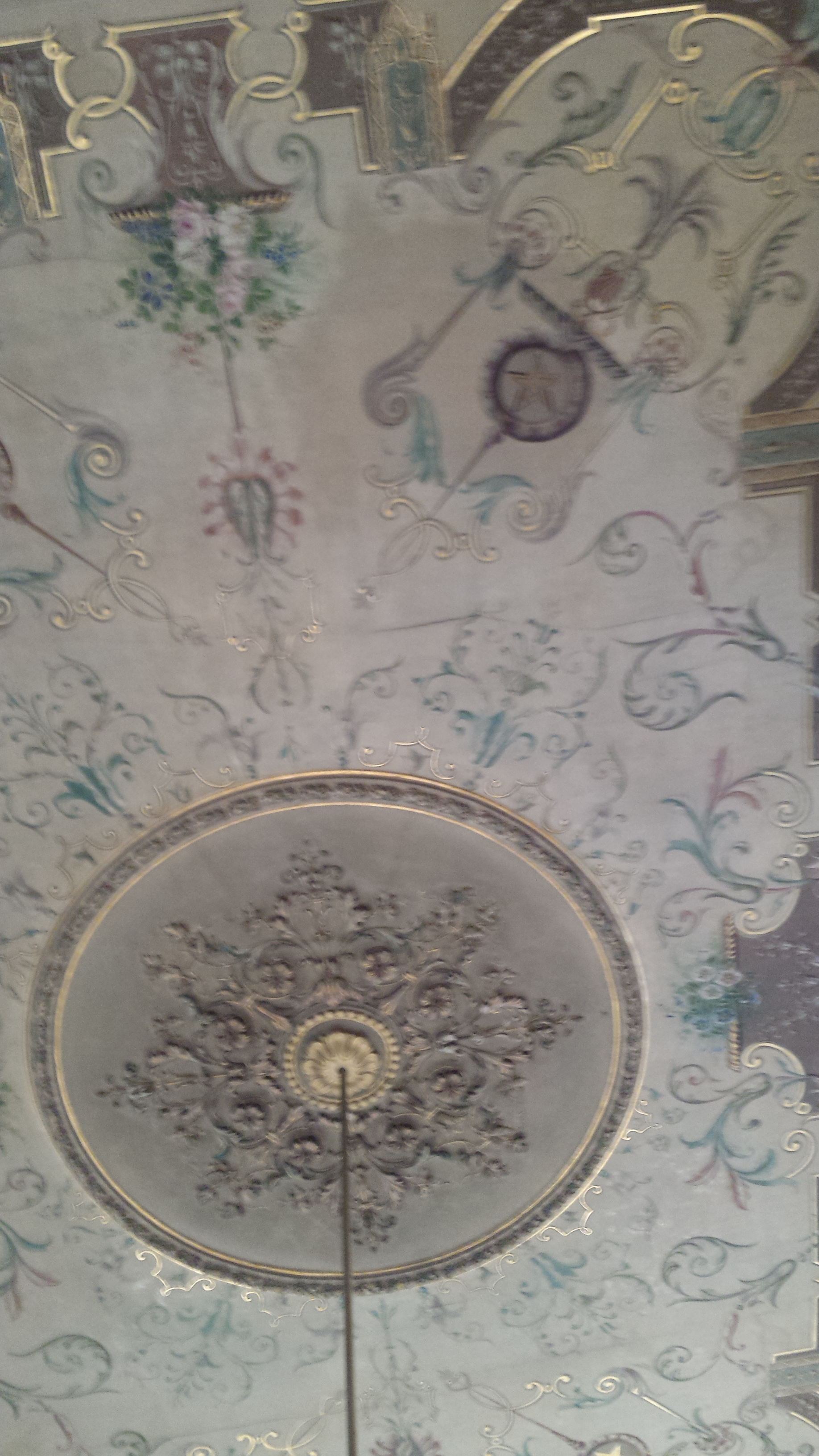 detalle del techo de una sala en el edificio patrimonial donde funcionan las oficinas de la terminal portuaria Cuenca del Plata, en Uruguay